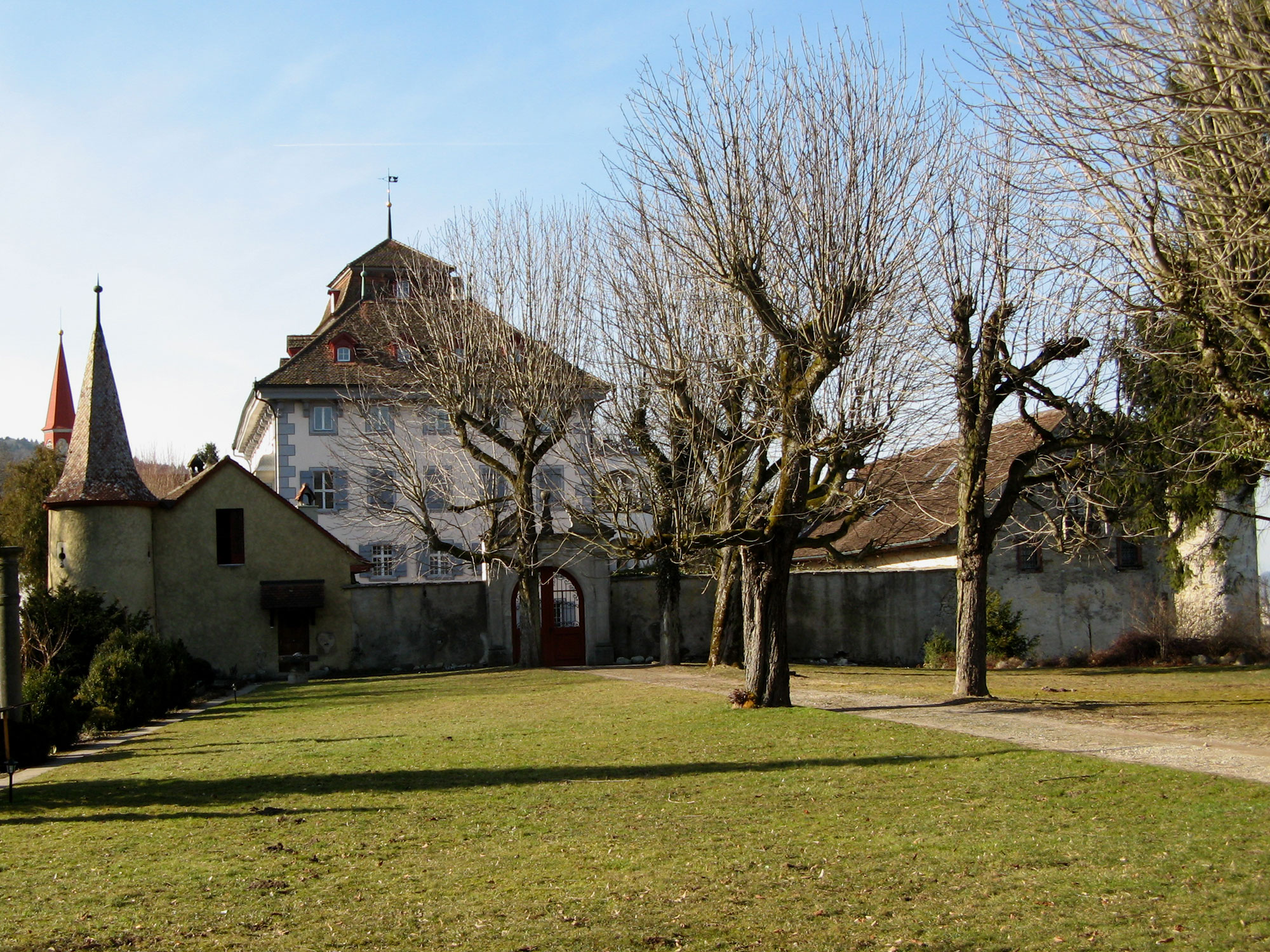 Schloss Hilfikon, von der Südseite aus gesehen